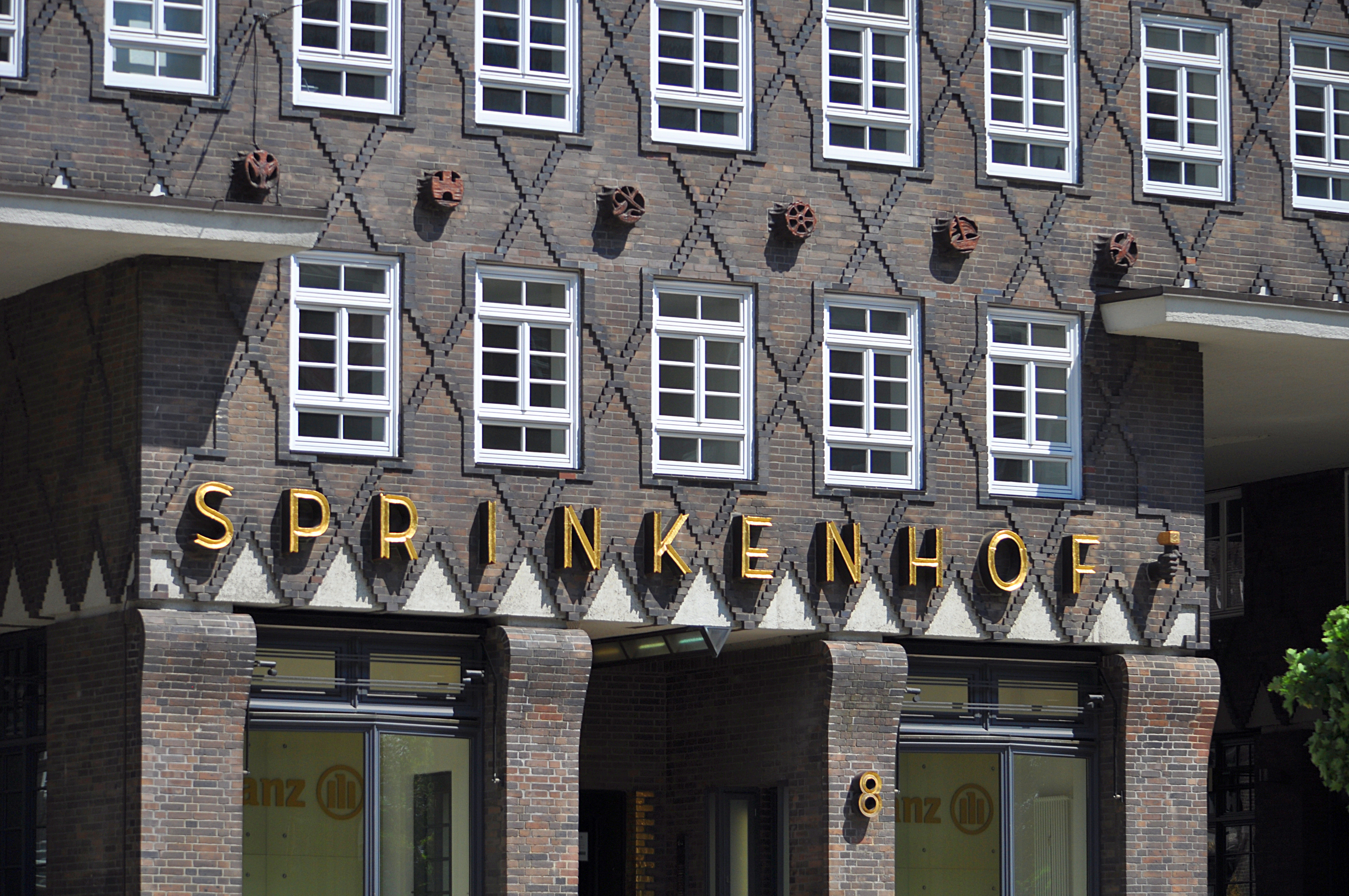 Eingang Burchardstraße 8 des Sprinkenhofs in Hamburg-Altstadt. This is a photograph of an architectural monument.